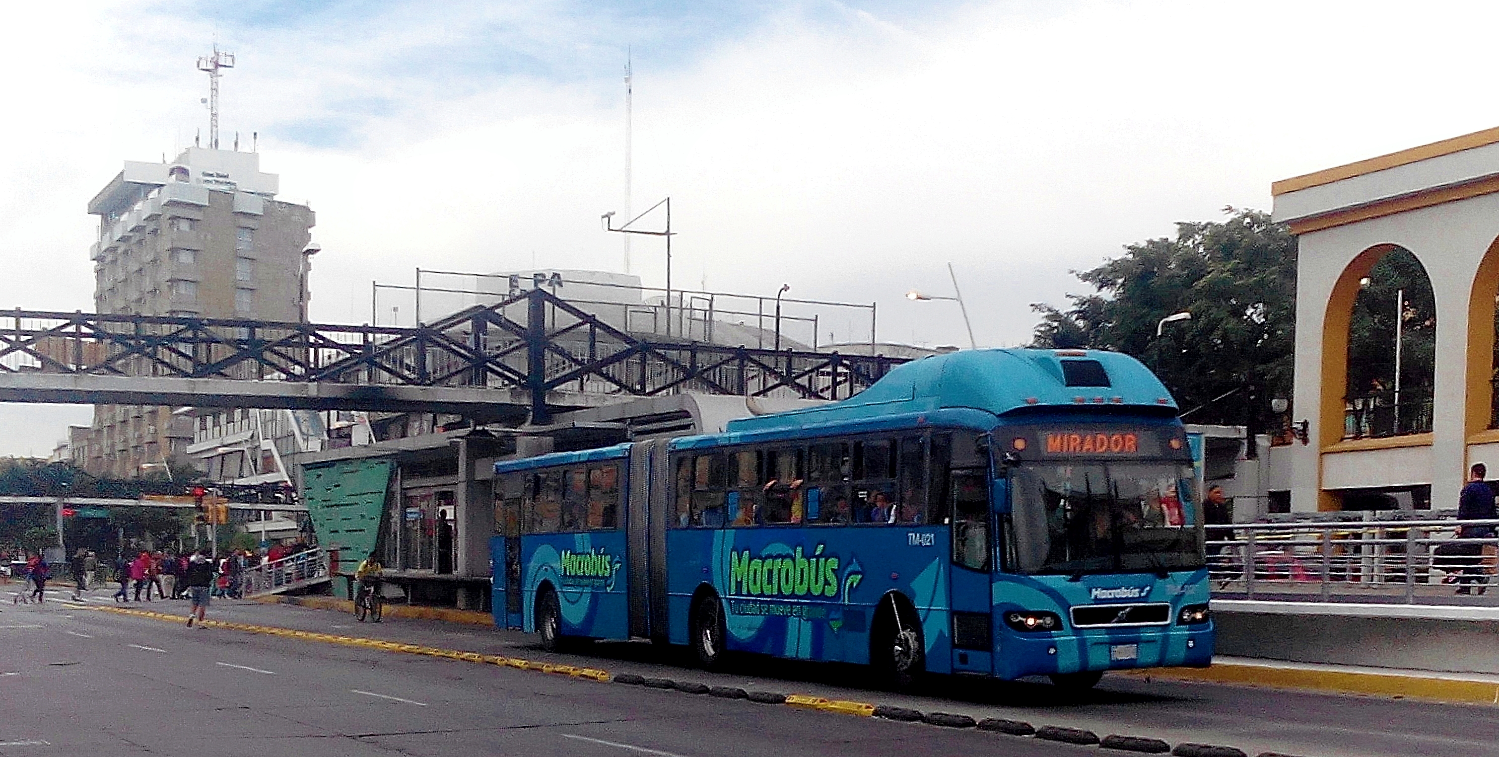 Sistema de BRT de Guadalajara, México